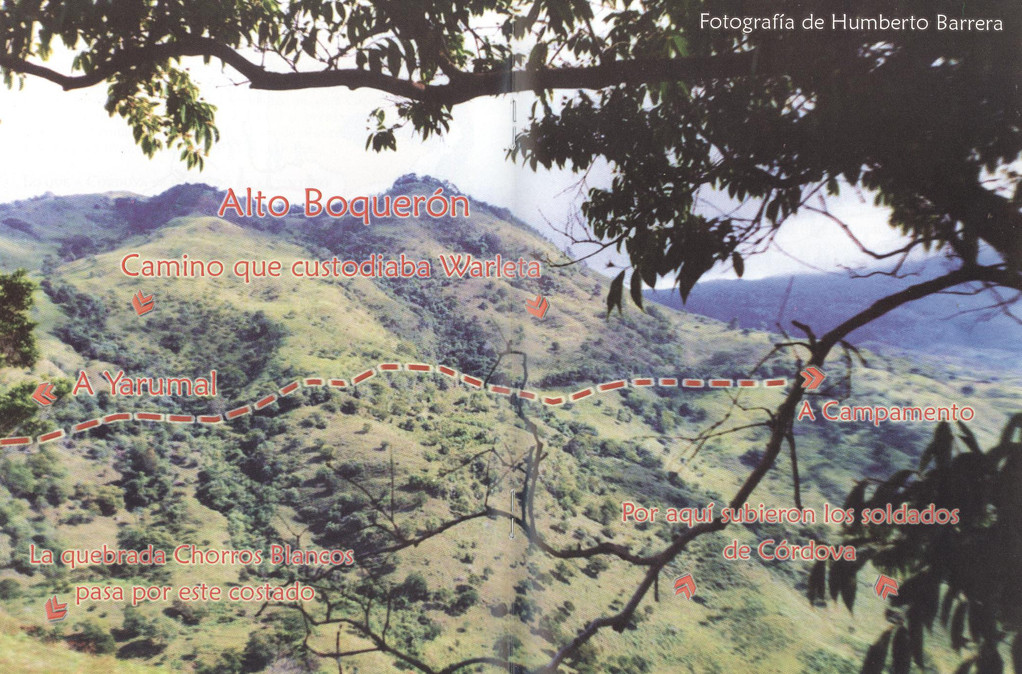 Foto tomada de